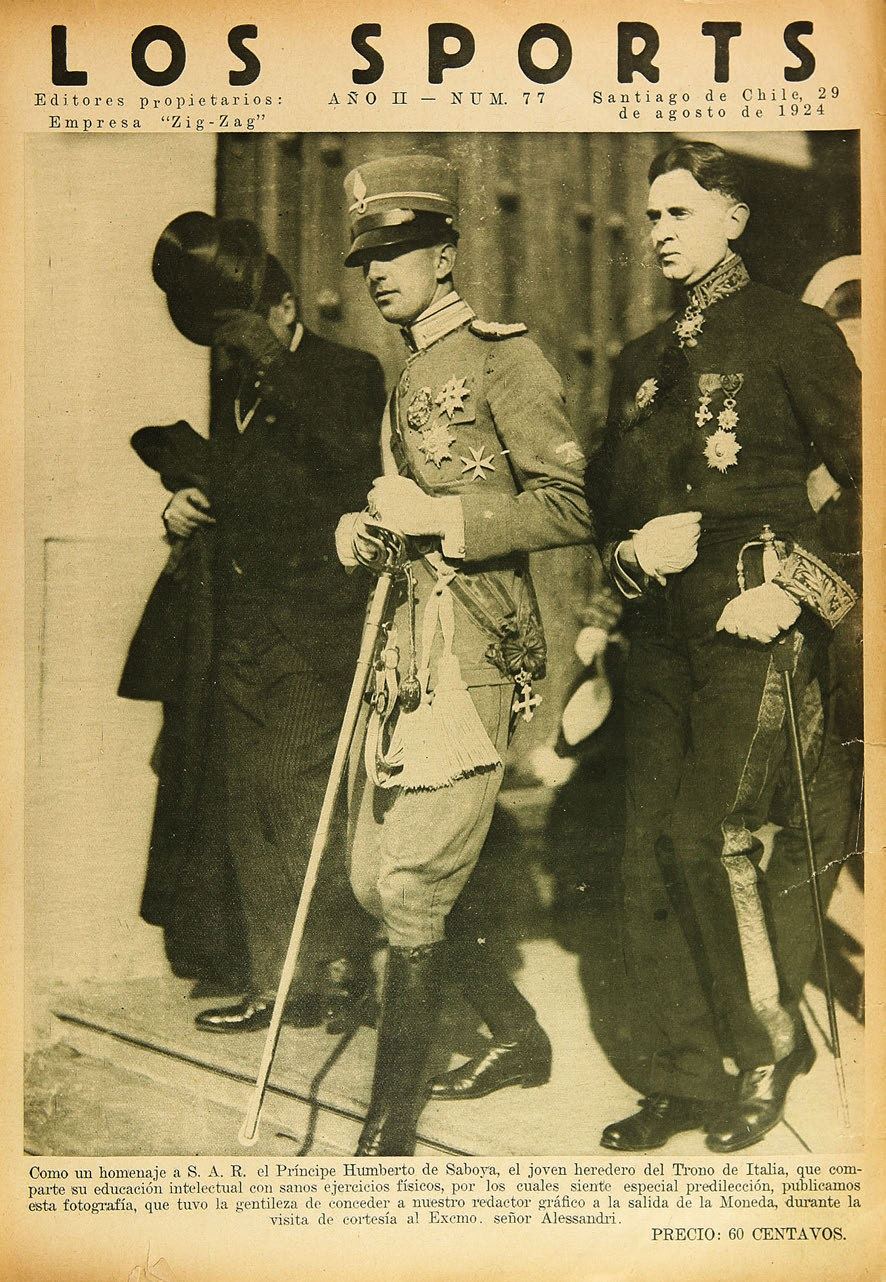 Los Sports, número 77, 29 de agosto de 1924